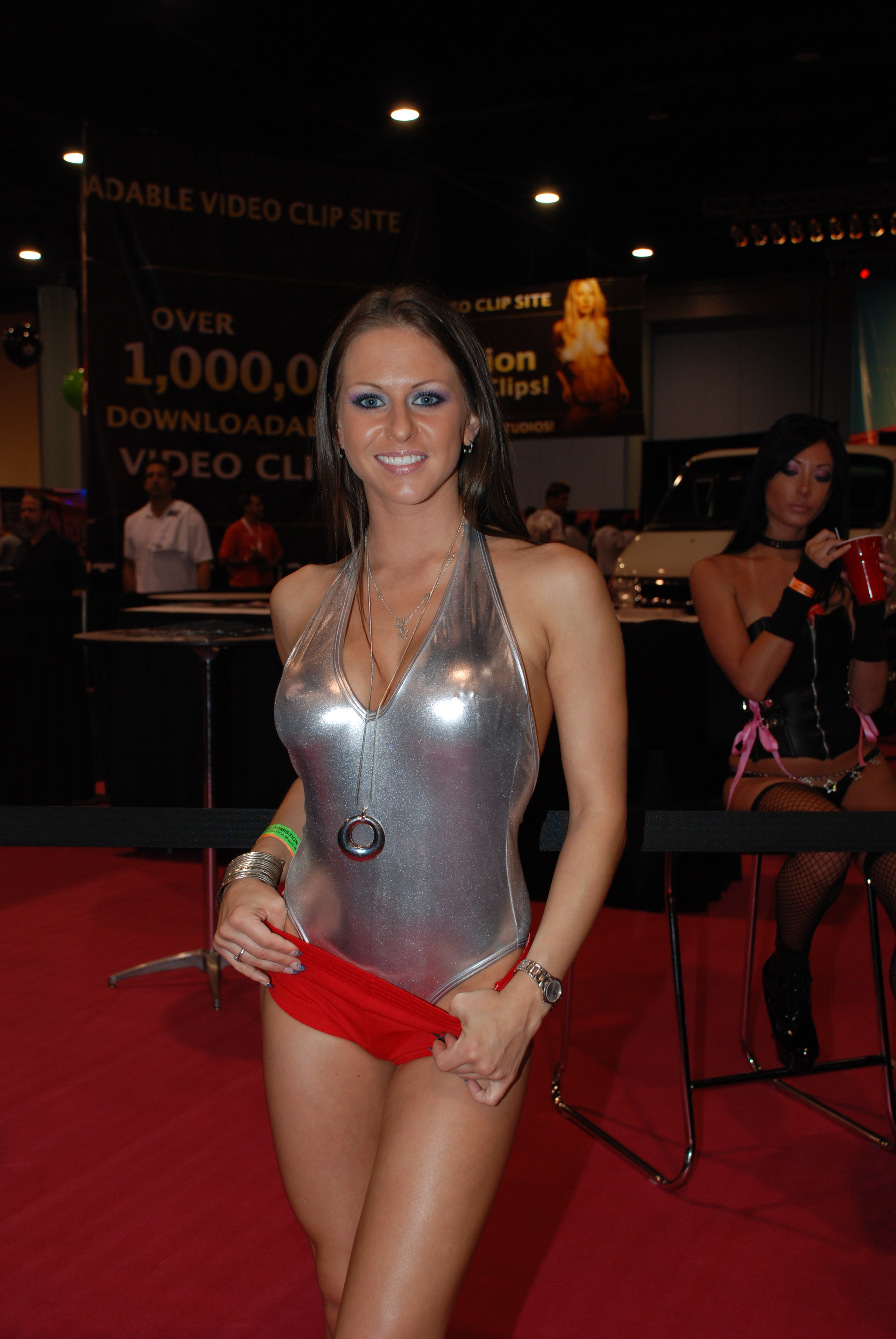 Miami Eroticaxxx 5-8-09 Nikon 346